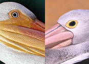 Pelican Eyes-comparison1.jpg: Порівняння зовнішнього вигляду голови австралійського і американського білого пеліканів